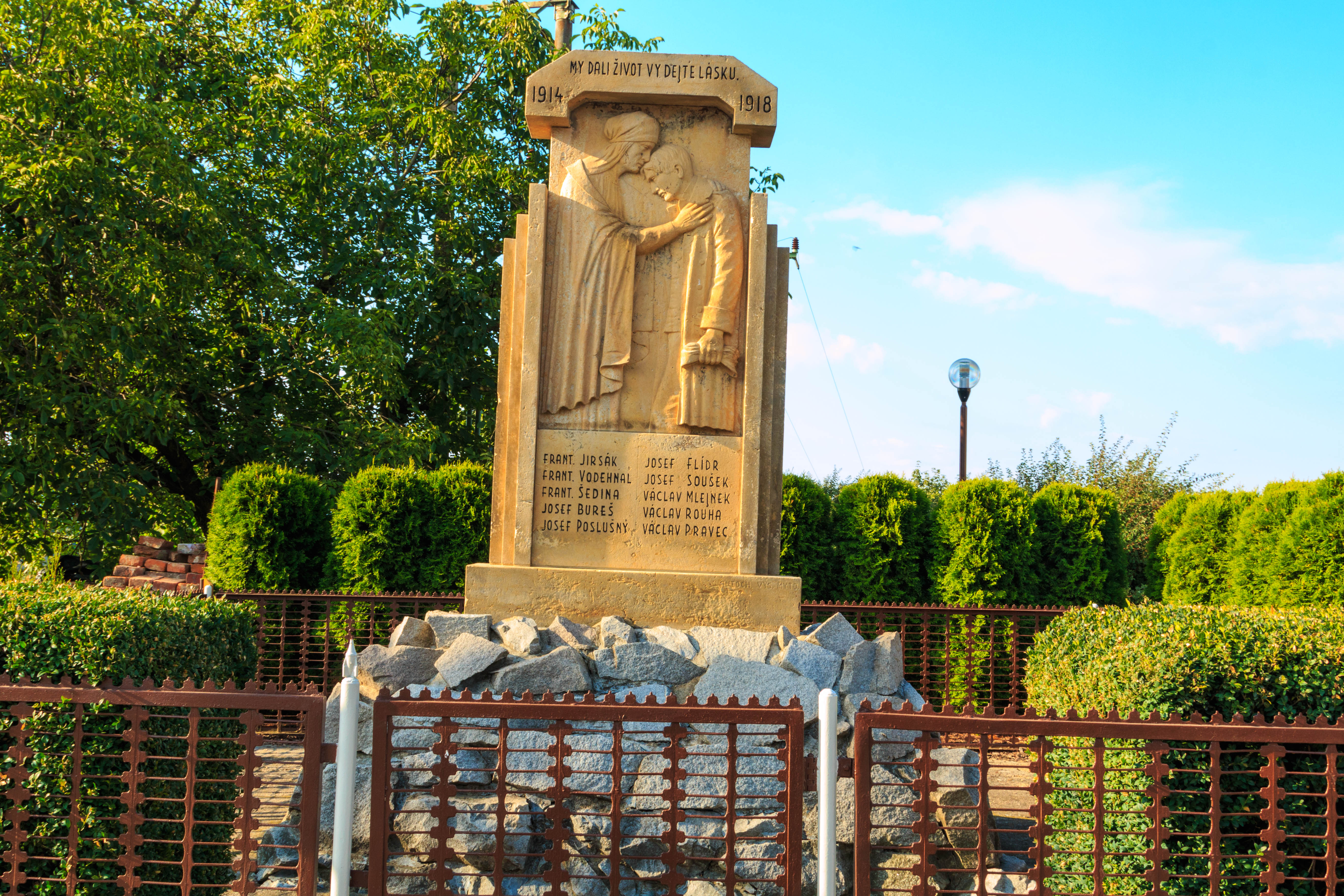 Libecina - pomník padlých